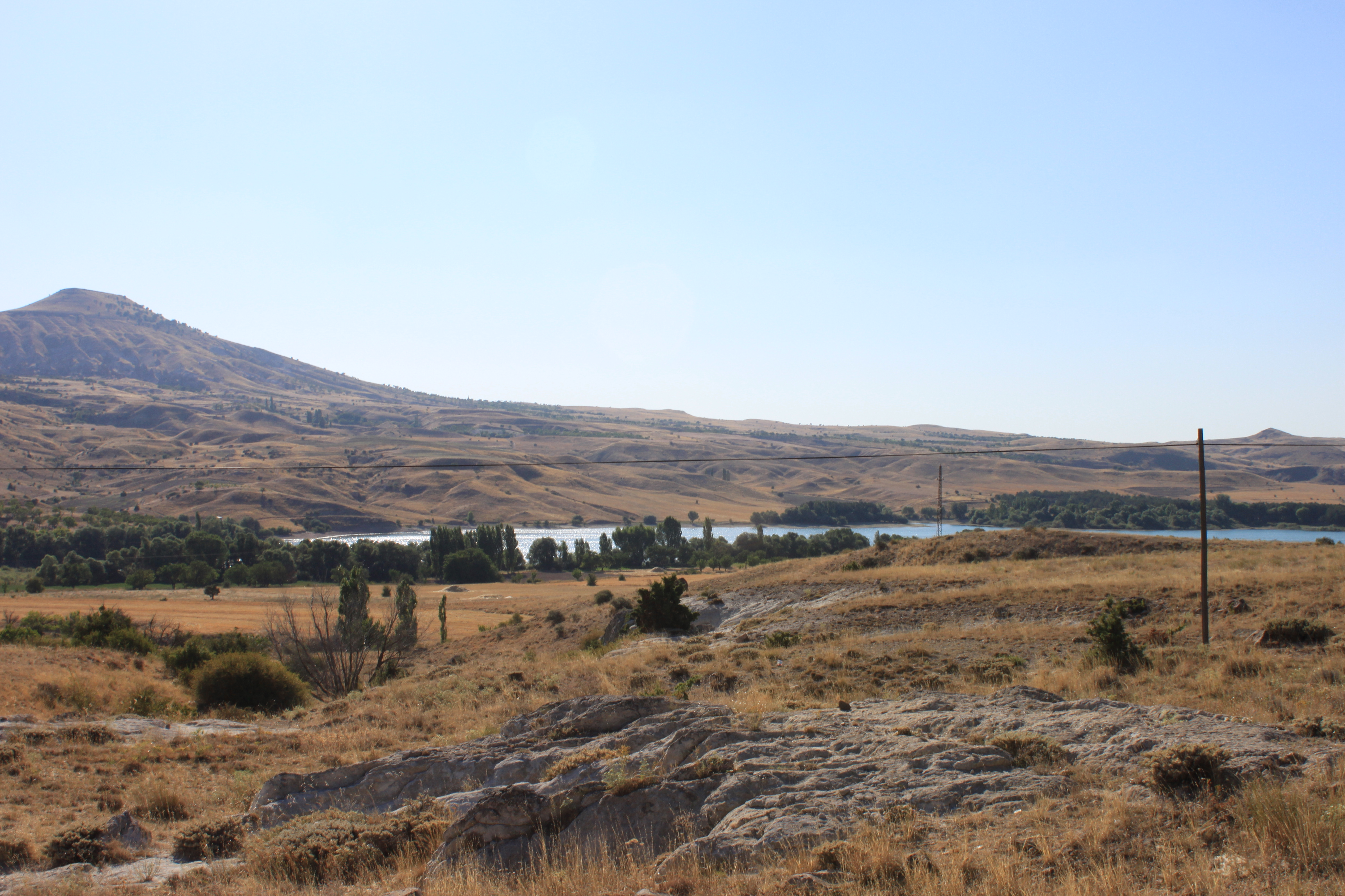 Damsa Stausee südlich von Mustafapaşa, Landkreis Ürgüp, Provinz Nevşehir, im Sommer